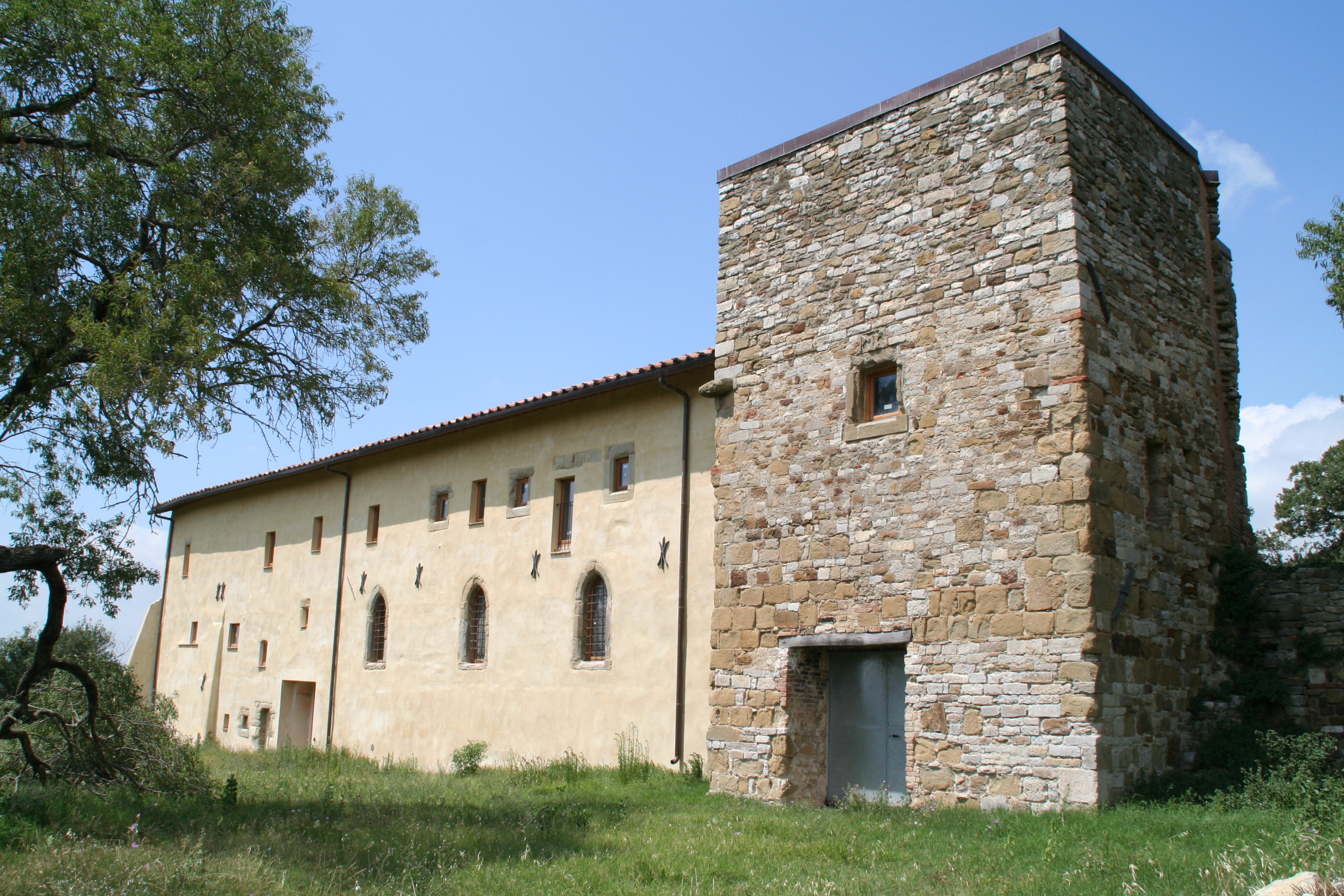 Isola Polvese Klosterruine